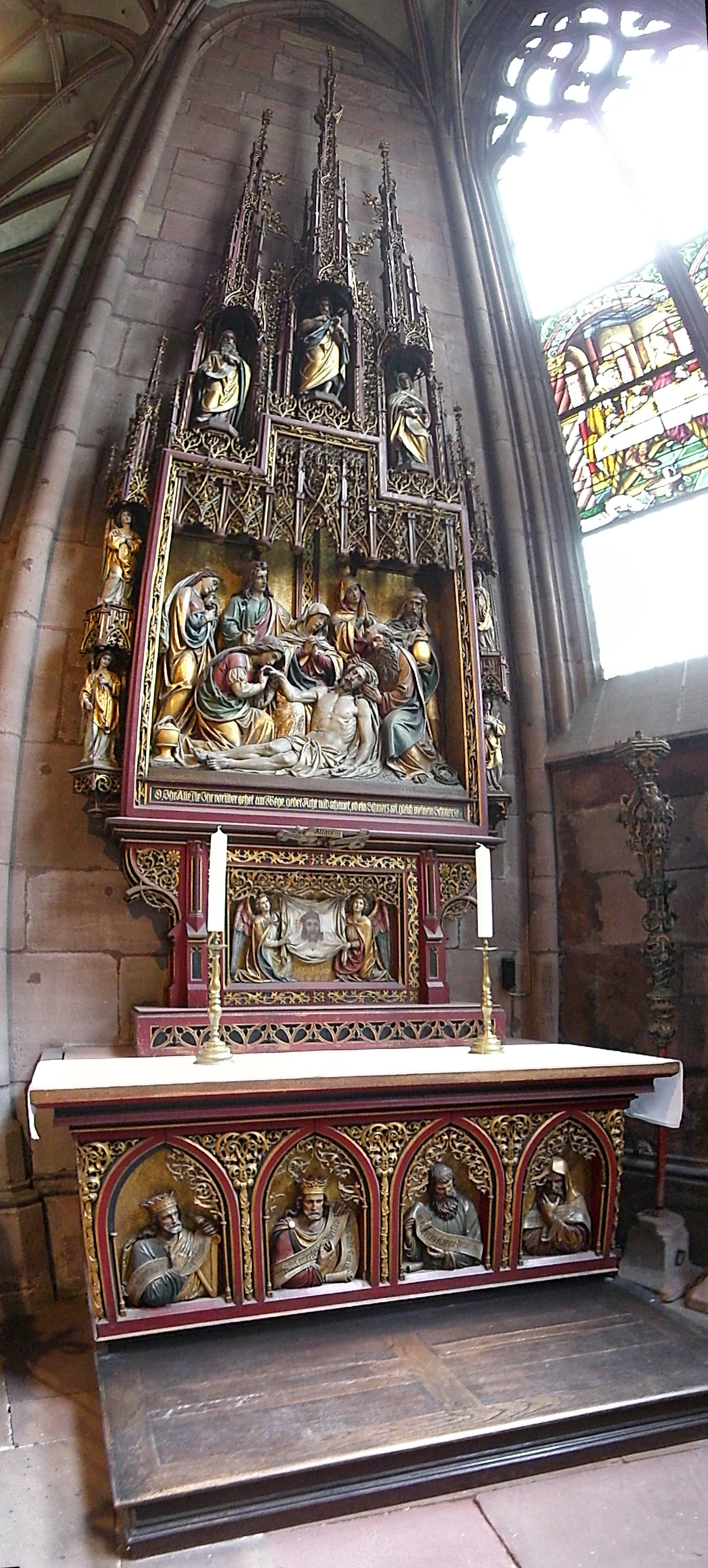 Johannesaltar Herkunft: Neugotisches Werk der Firma Marmon, Sigmaringen. Abbildung: Beweinung Christi durch Johannes, Maria Magdalena, Maria Salome, Josef von Arimatea.